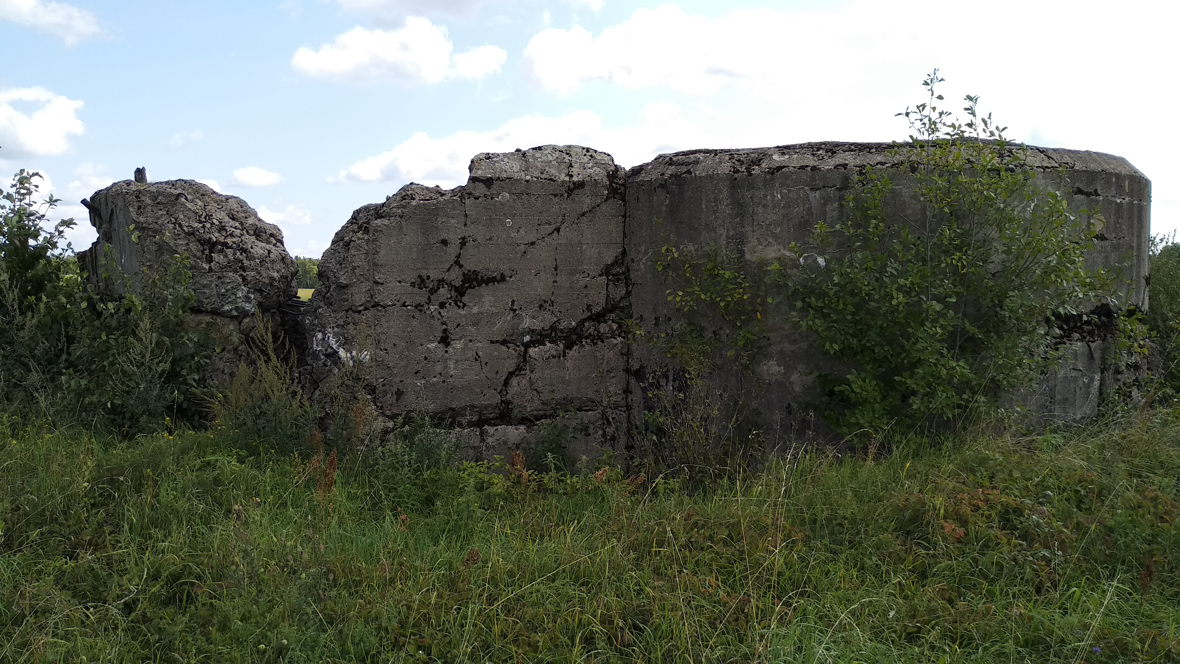 Wysadzony schron ciężki odcinka obrony Wizna z 1939 roku.